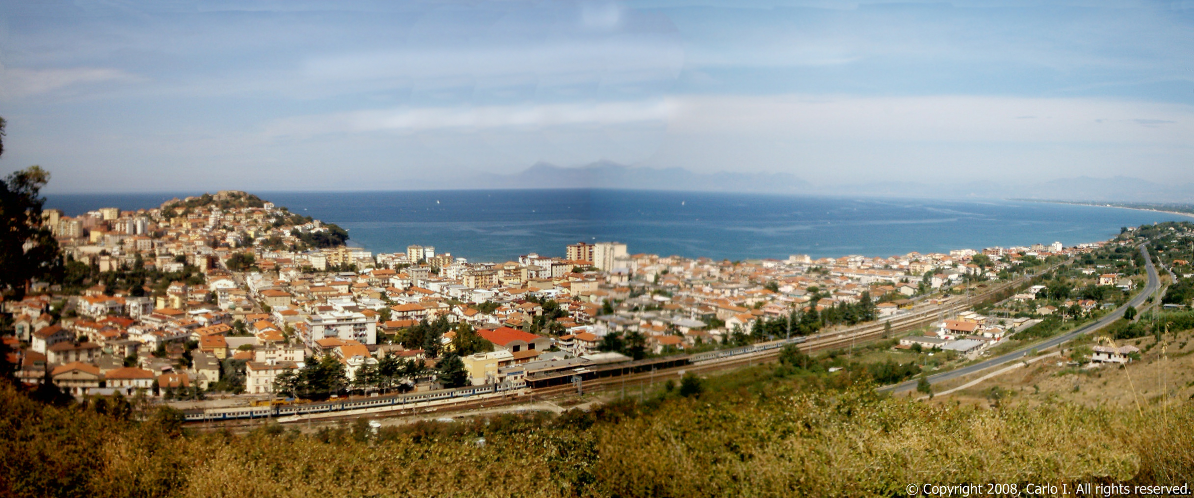 Agropoli - La Città